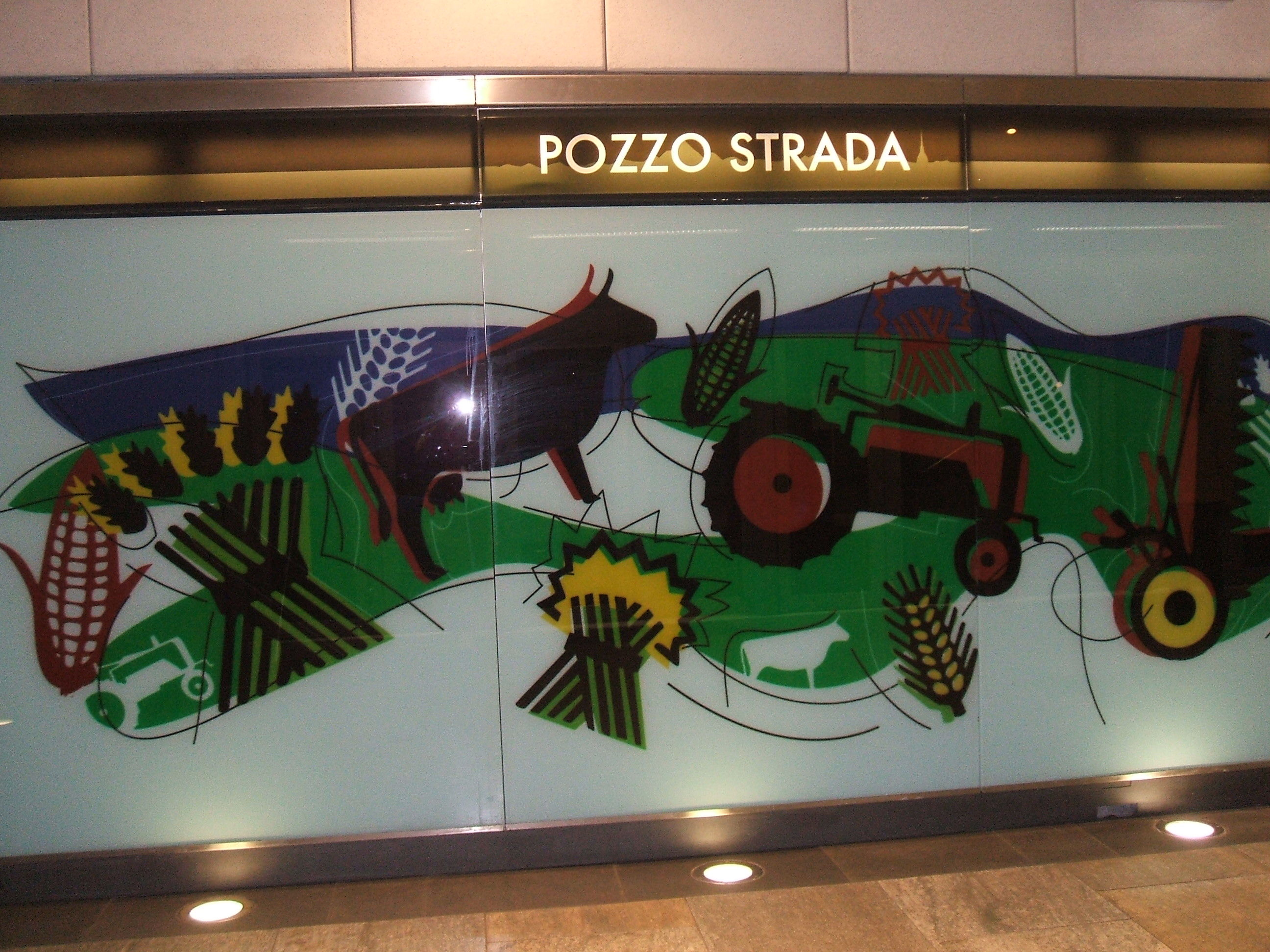 Vetrofania alla Stazione Pozzo Strada della Metropolitana di Torino.